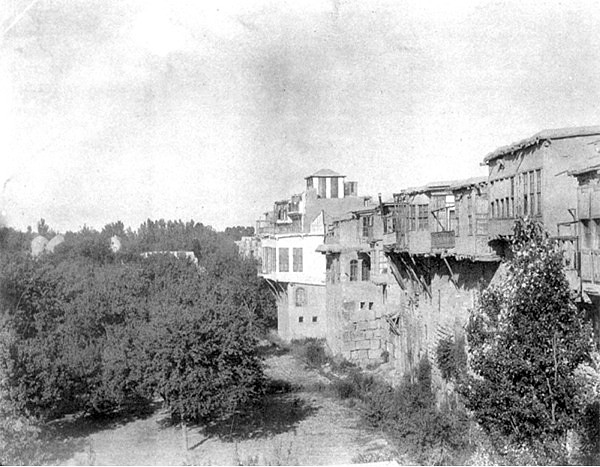 سور دمشق بين الباب الشرقي وباب توما فرانسيس 1887